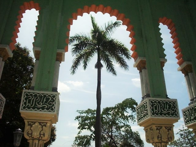 Detalles de la Glorieta de Manzanillo y trazados arabescos